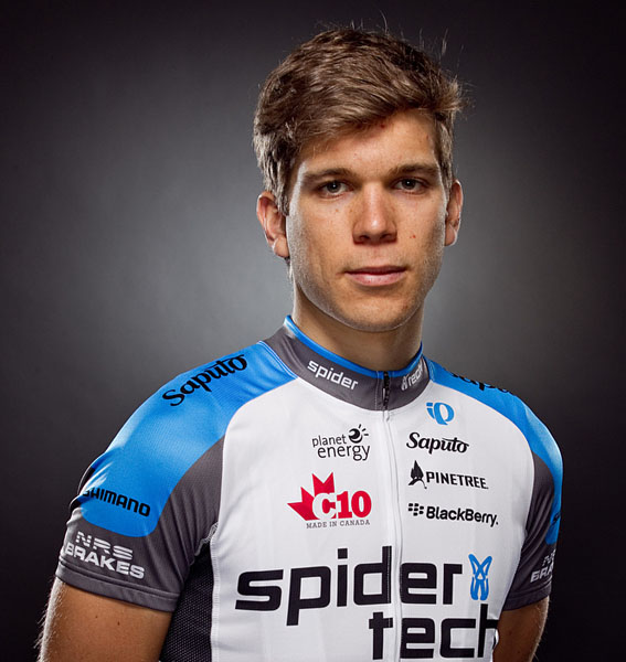 Guillaume Boivin